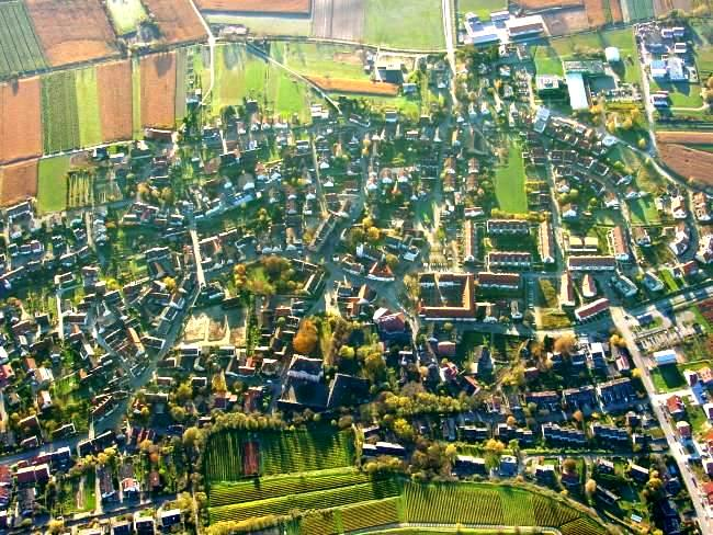 Luftbild von Luftbild von Freiburg - Munzingen, aufgenommen bei einer Ballonfahrt